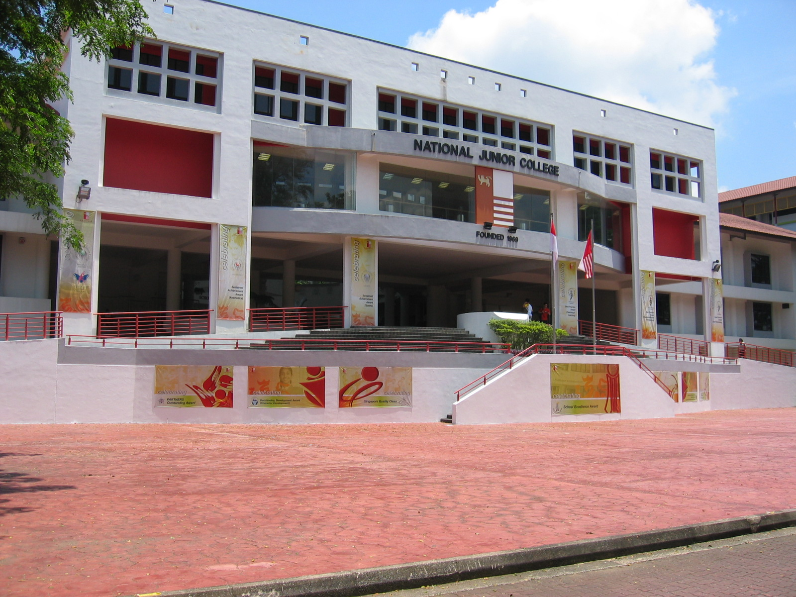 中文（新加坡）: 国家初级学院